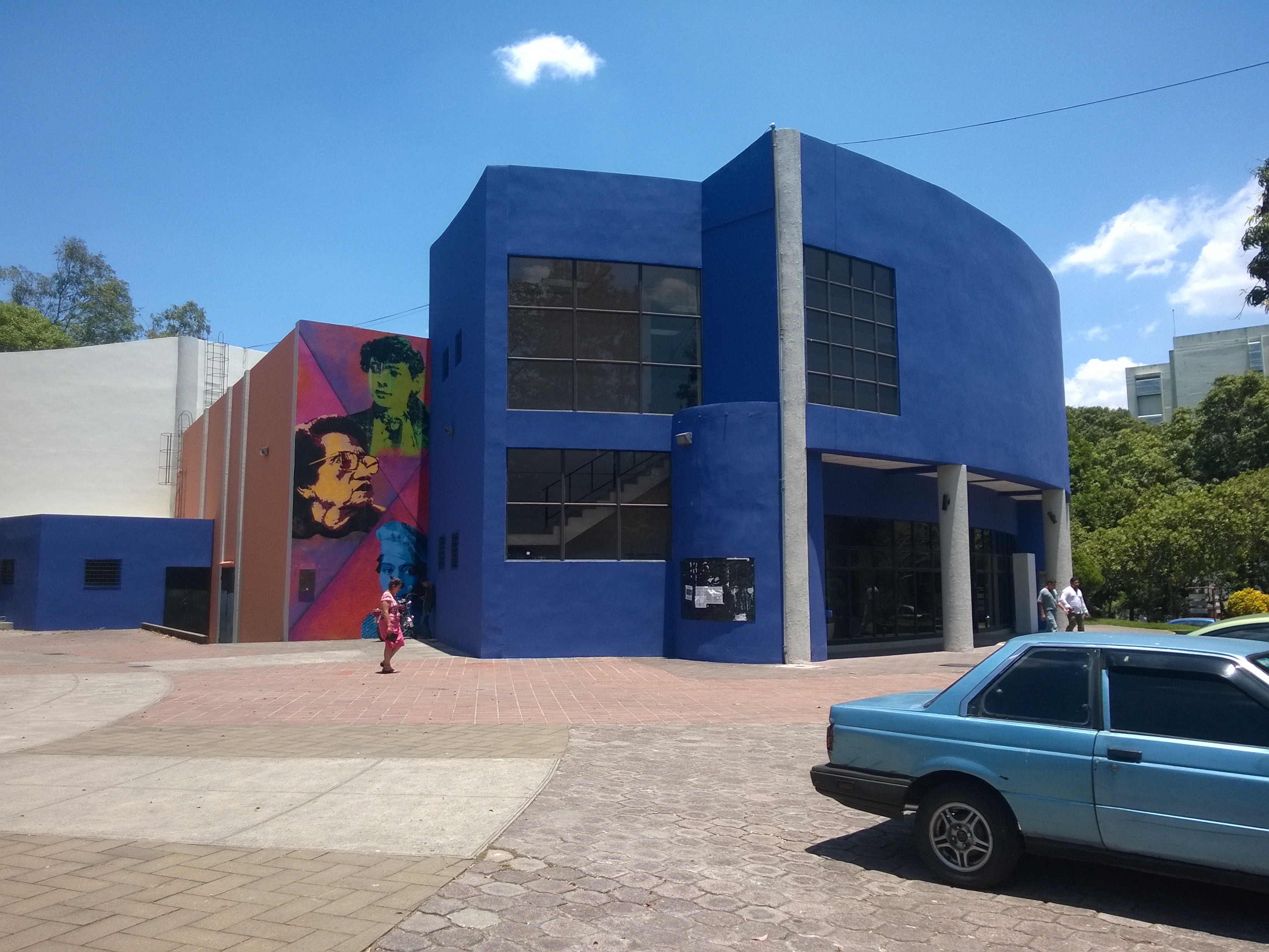 Fachada del Teatro Universitario de la Universidad de El Salvador.